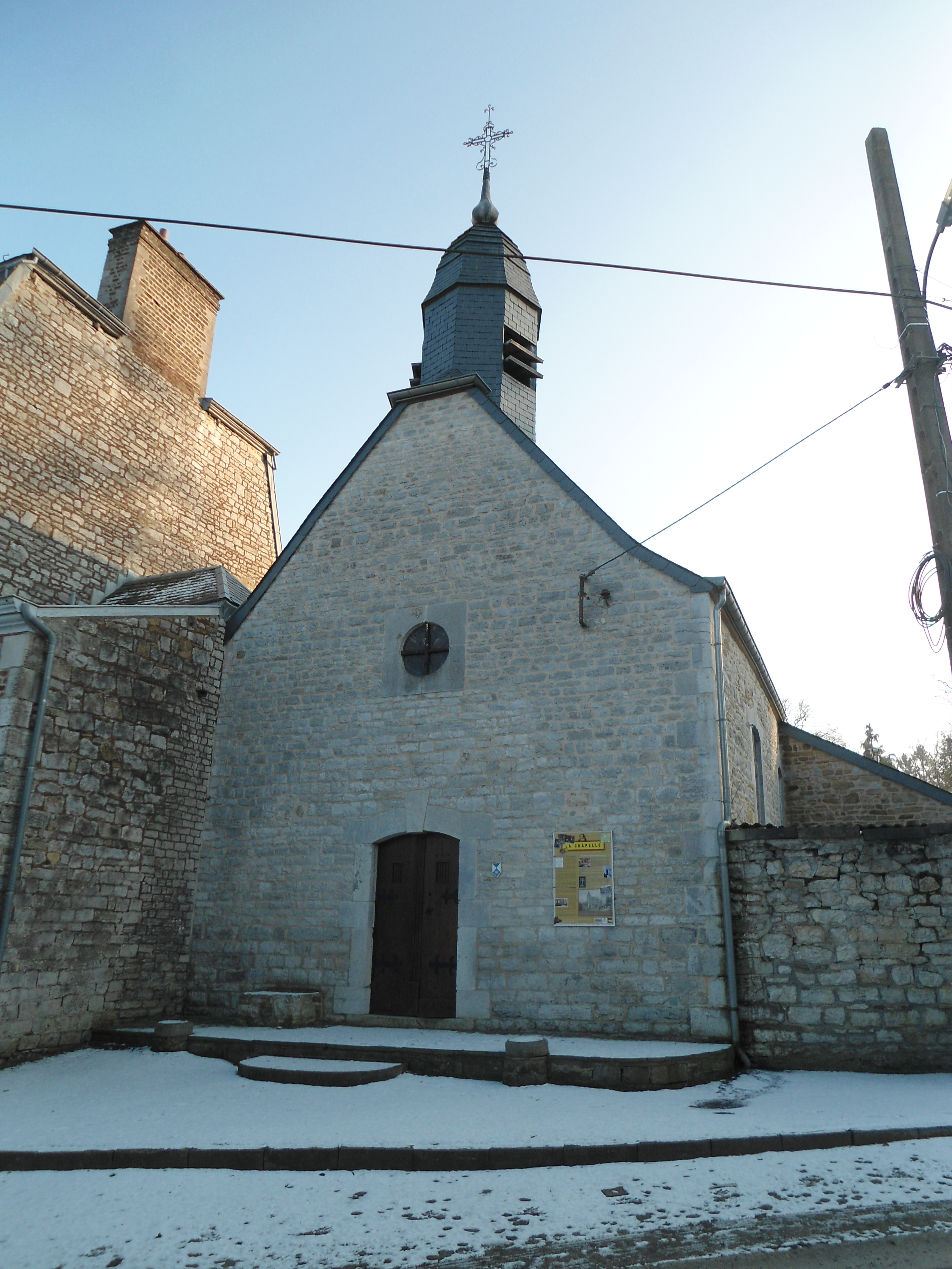 Chapelle Blindef (Sprimont)